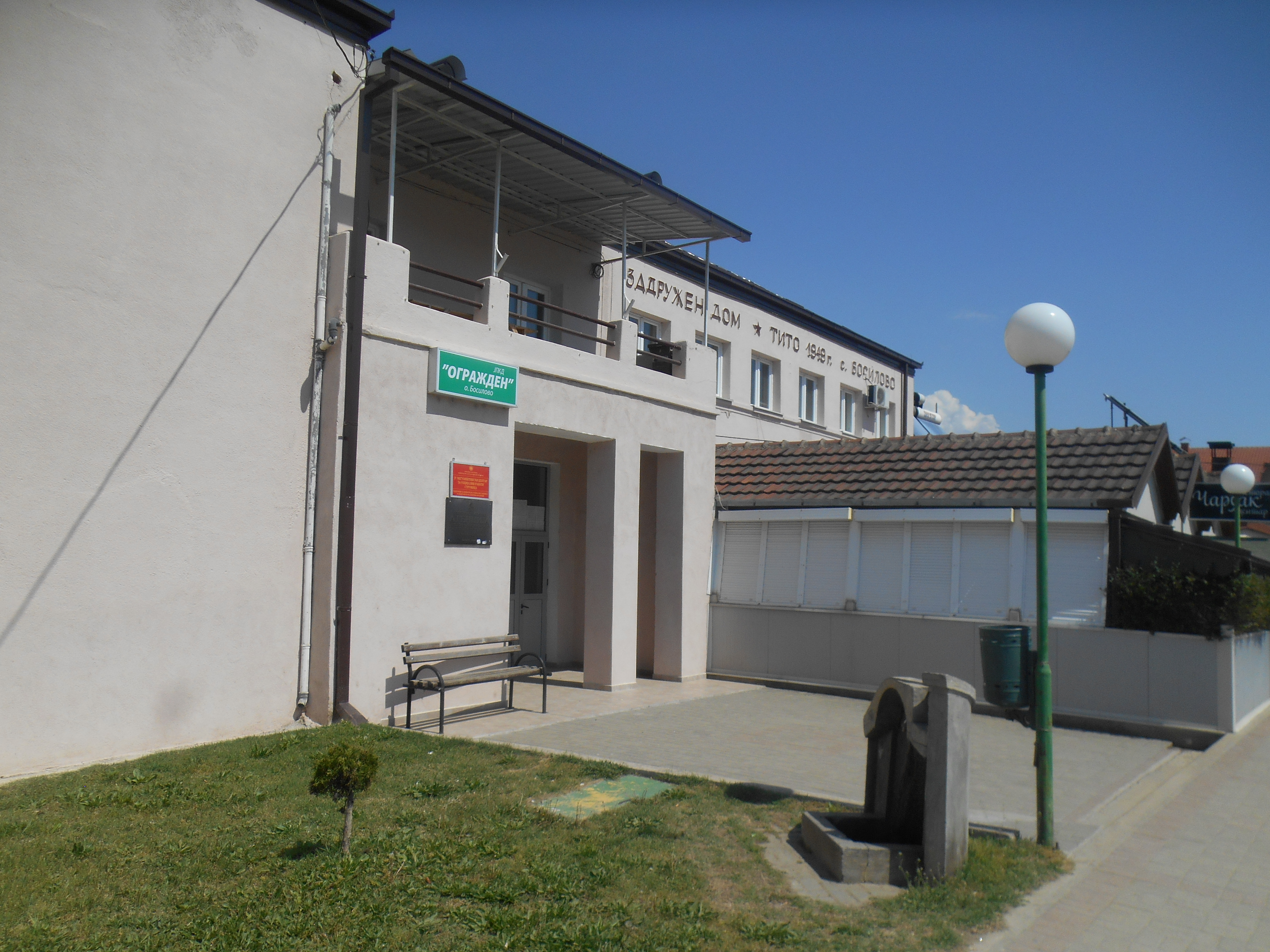 Дом на културата во Босилово